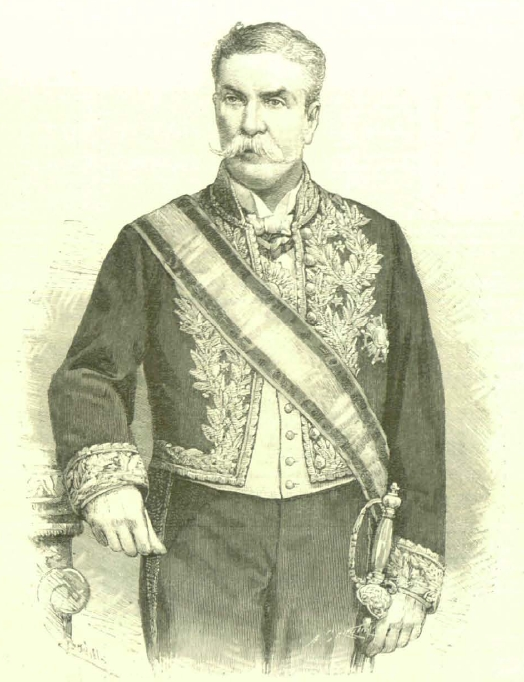 Excmo. Sr. D. Aniceto Vergara y Albano, Ministro Plenipotenciario de Chile en Madrid.